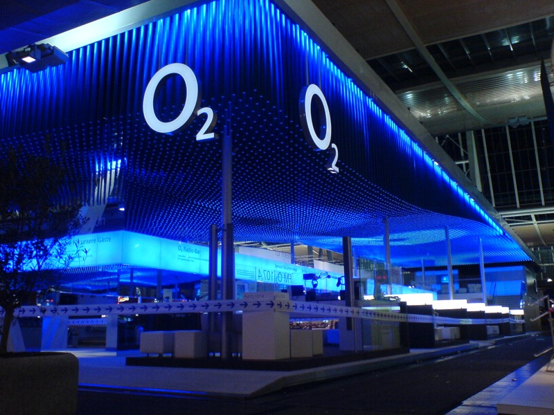 O2 hatte definitiv etwas beeindruckendes